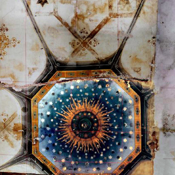 Synagoge zu Eisleben, Deckenbemalung Decke über 2. Obergeschoss, Mitte